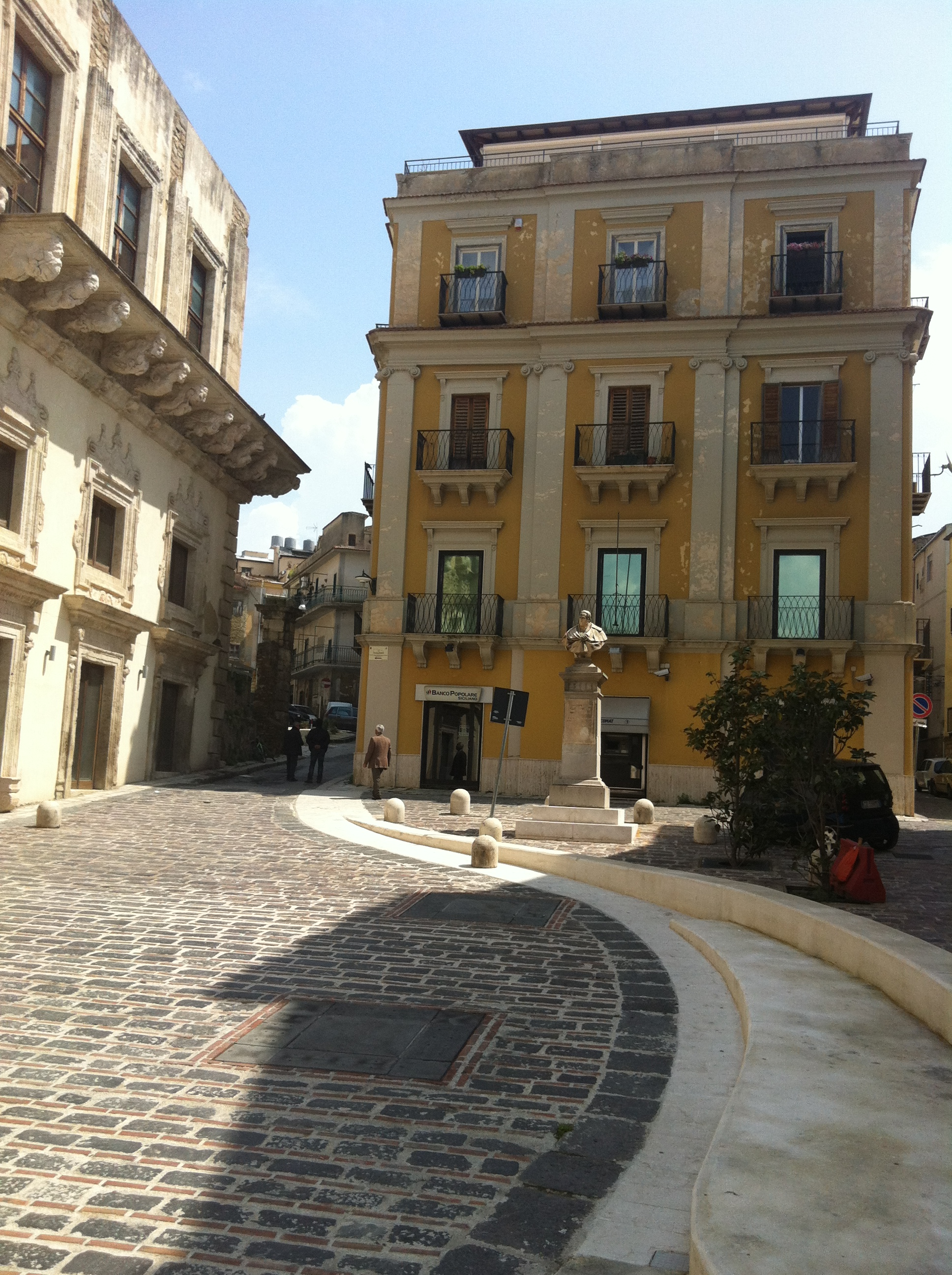 Monumento a Mauro Tumminelli a Caltanissetta.